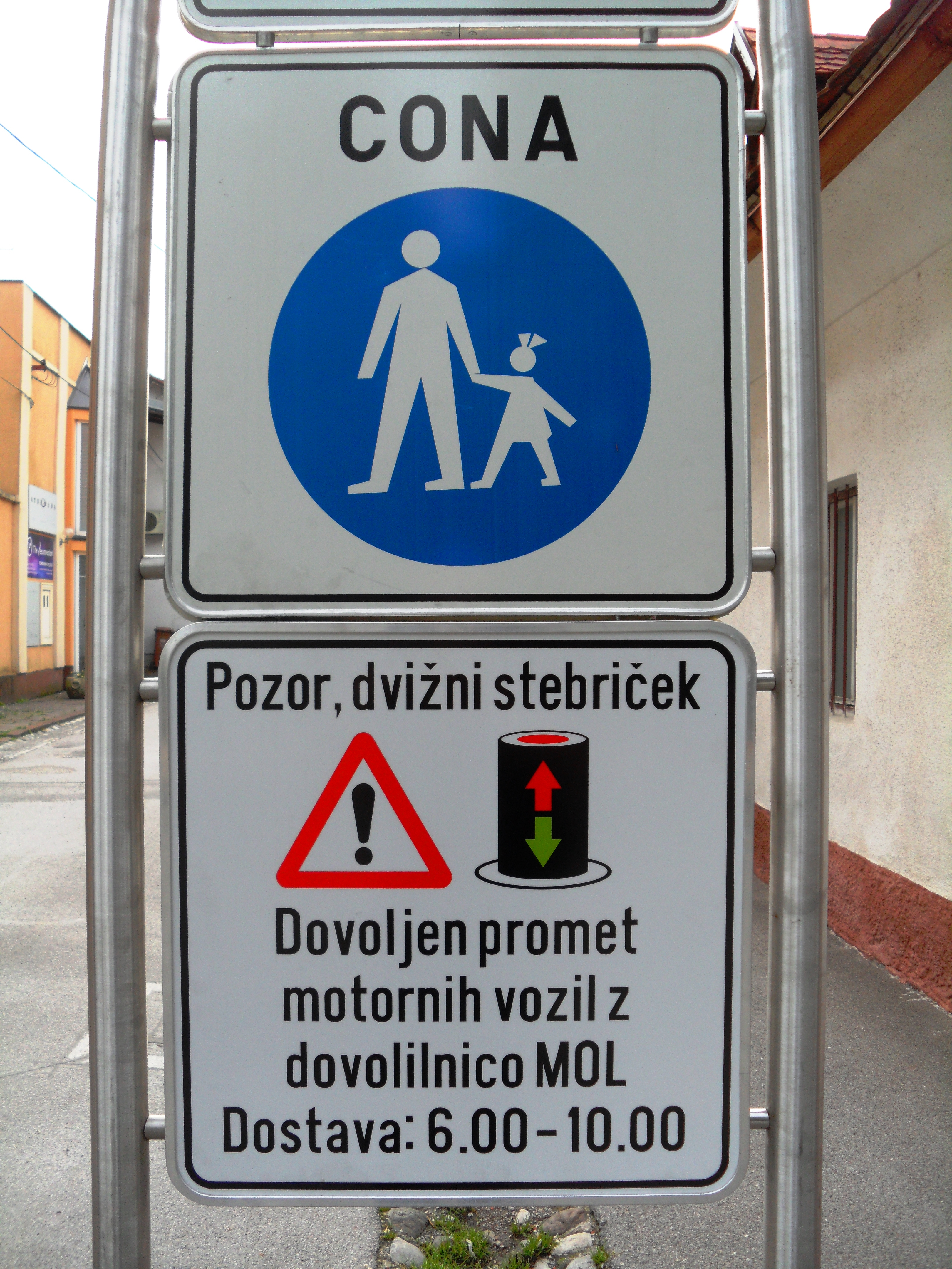 Območje za pešče v Ljubljani (Krakovo)